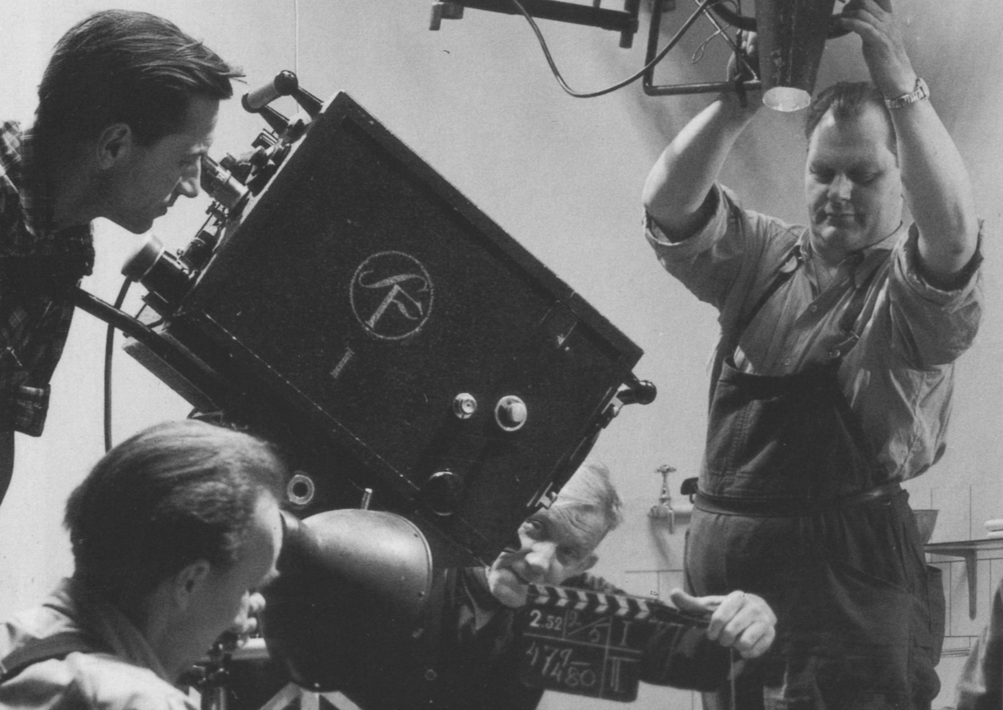 Filmfotograf Gunnar Fischer (bakom kameran) under inspelningen för "Kvinnors väntan"